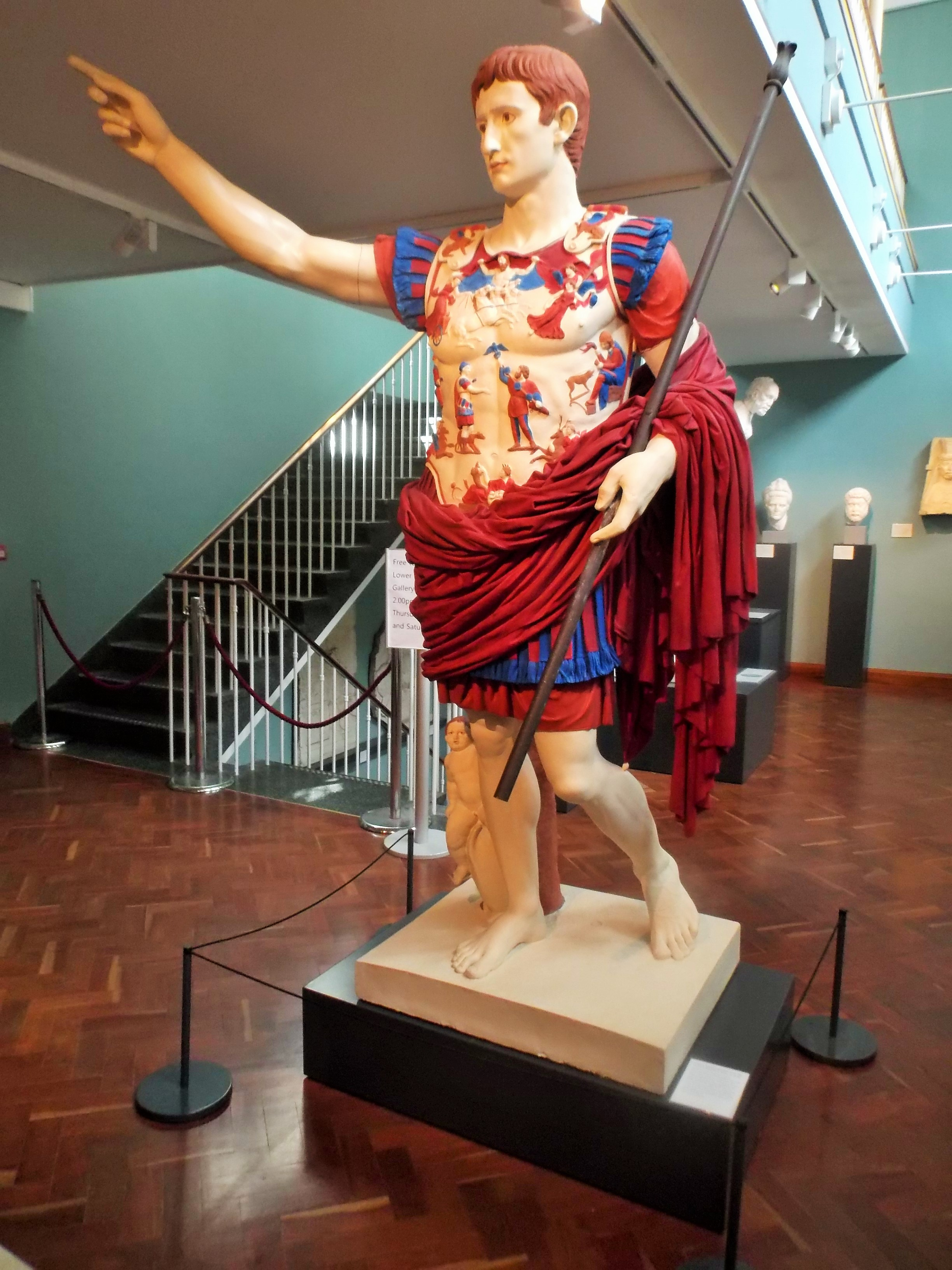 Réplique de l'Auguste de Prima Porta avec restitution des parties colorées connues. Vue générale de trois-quarts face. Ashmolean Musem, Oxford, Royaume-Uni. Mai 2016.